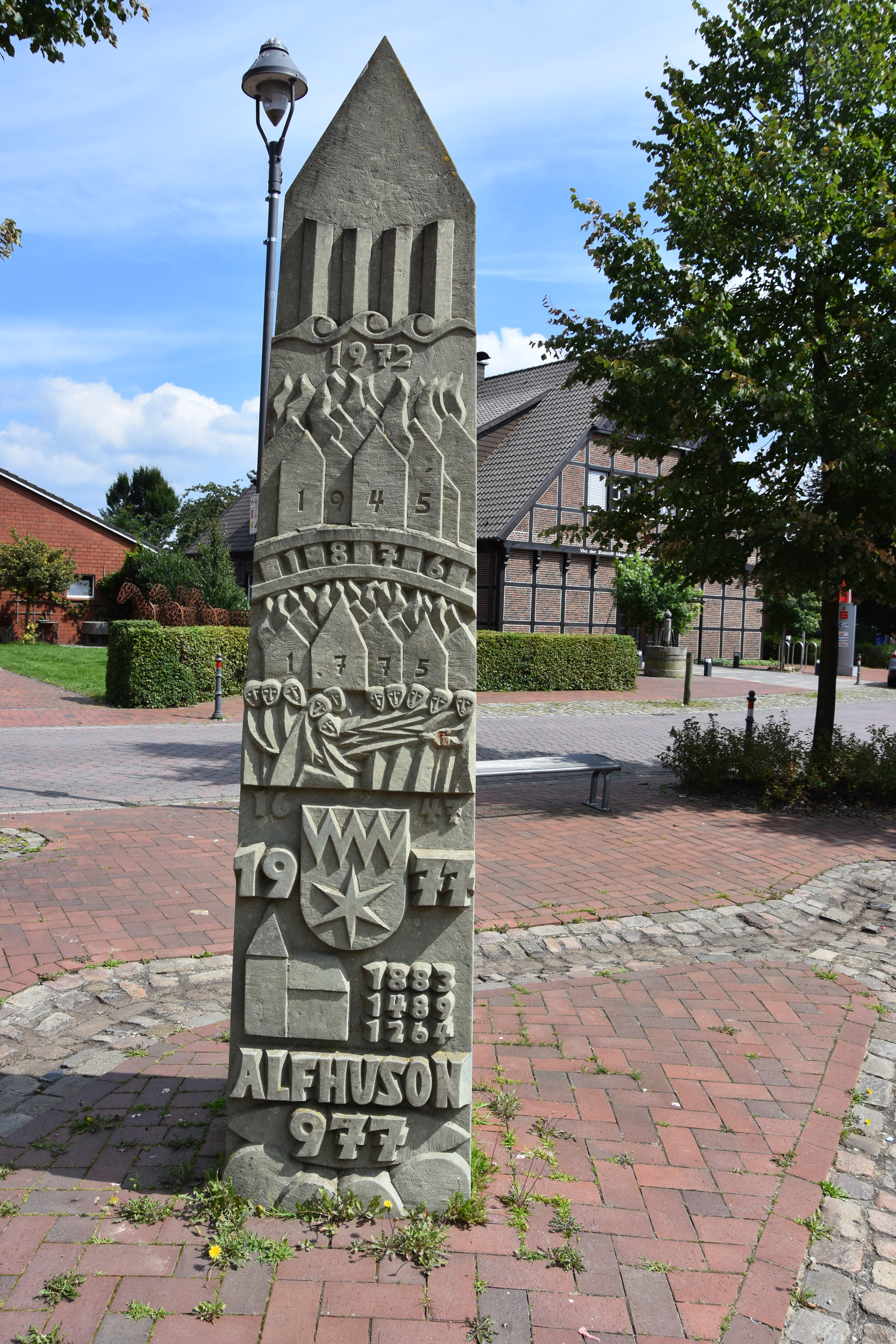 Dorfbrunnen in Alfhausen. Anlässlich des 1000-jährigen Jubiläums des Ortes Alfhausen 1977 aufgestellt.